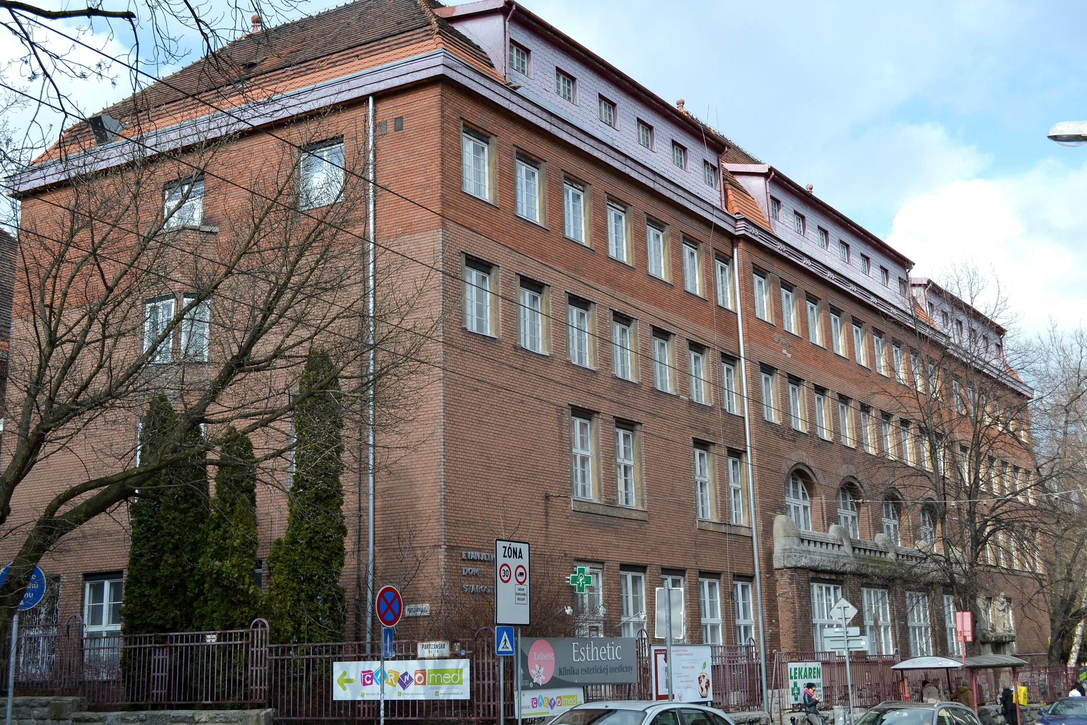 Partizánska ul. č. 2. Budova areálu pôvodnej evanjelickej nemocnice (dnes Evanjelický dom starostlivosti)